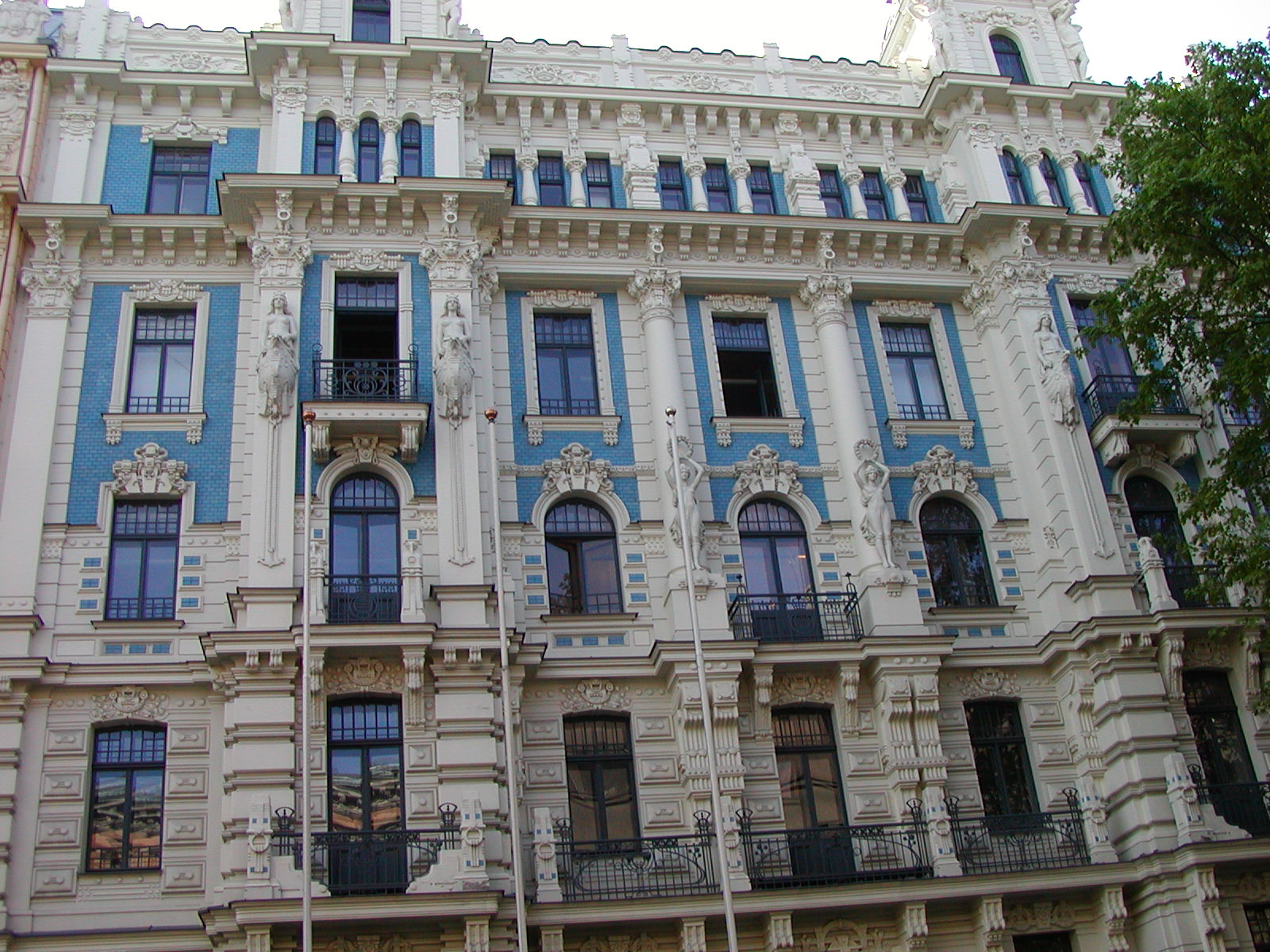 Building at Strelnieku iela 4a, architect Mikhail Eisenstein